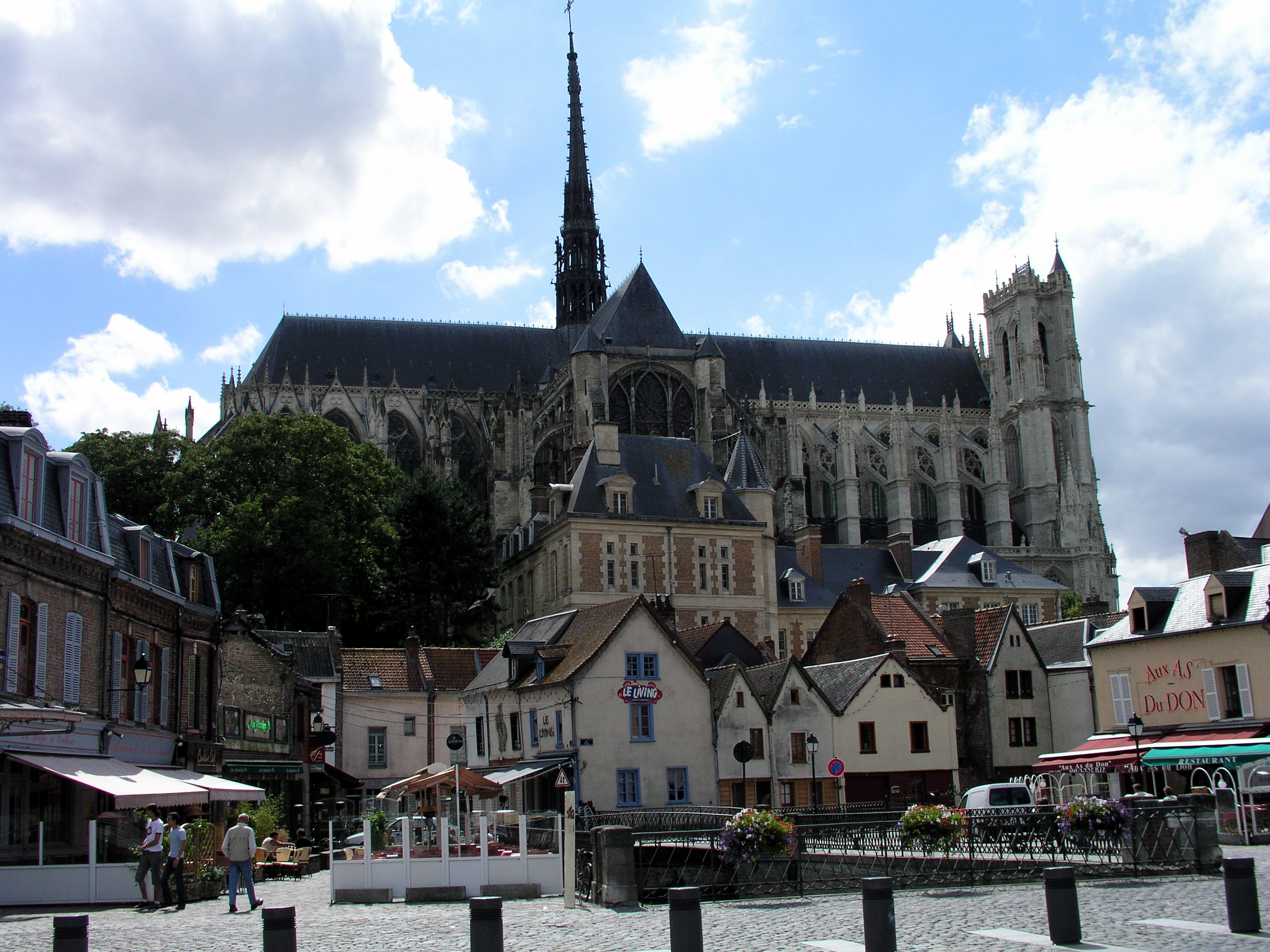 Amiens mit Kathedrale